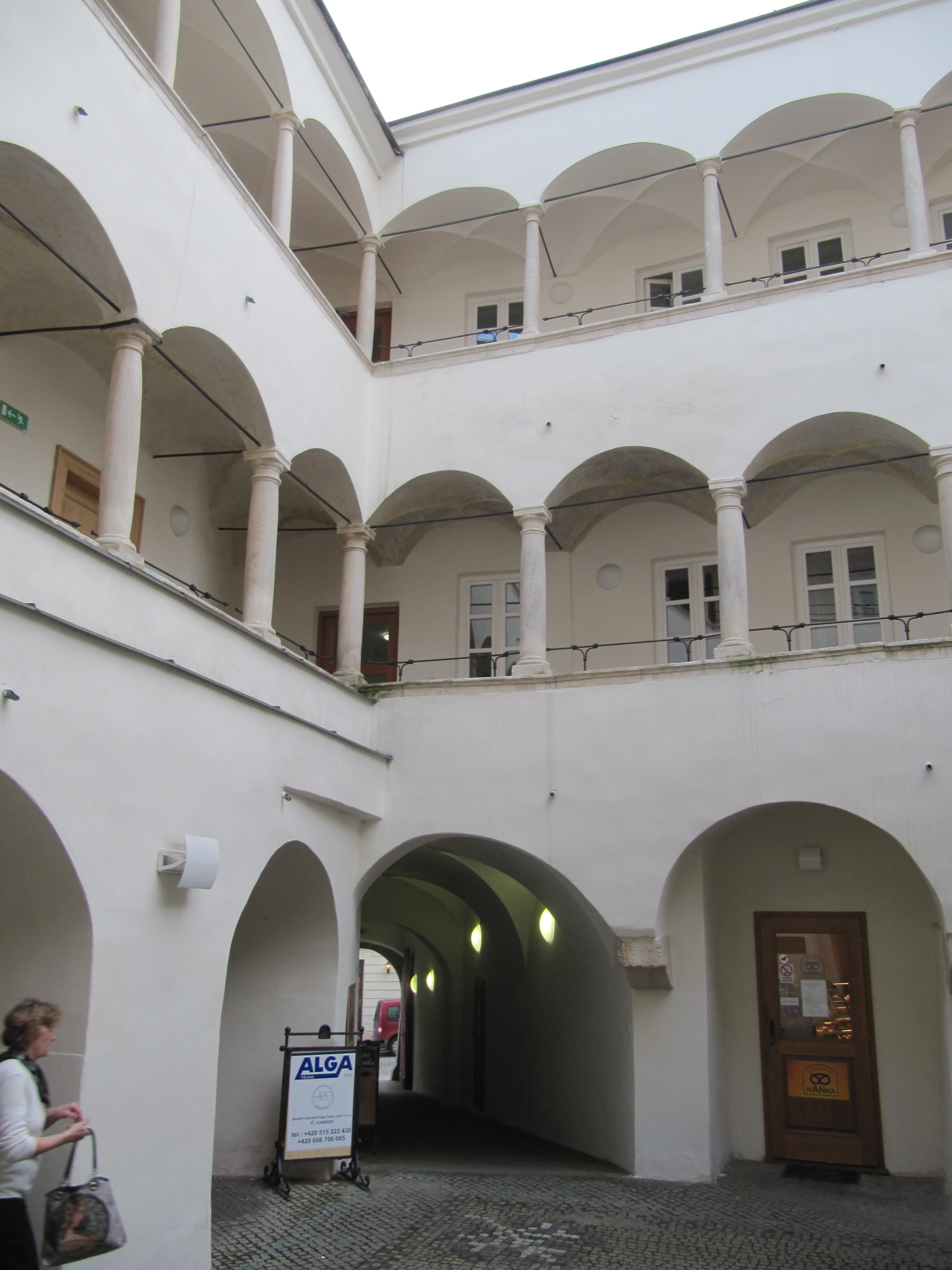 Městský dům (Znojmo), Obroková 2/10, Znojmo